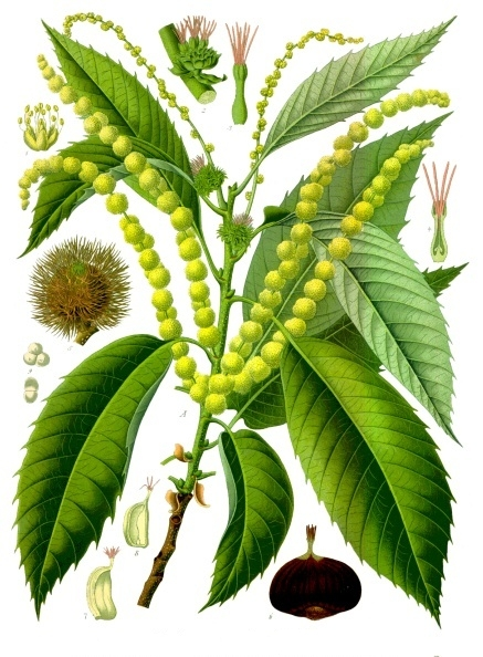 Edelkastanie. A Blühender Zweig. 1 Männliche Blüte; 2 Knäuel weiblicher Blüten; 3 weibliche Blüte; 4 dieselbe im Längsschnitt; 5 Kupula; 6 Frucht; 7 dieselbe im unreifen Zustande von der Seite gesehen; 8 dieselbe unreif im medianen Längsschnitt; 9 Stärkekörner. A 1/2 natürliche Grösse; 5, 6, 7, 8 natürliche Grösse; 1, 2, 3, 4, 9 vergrössert.